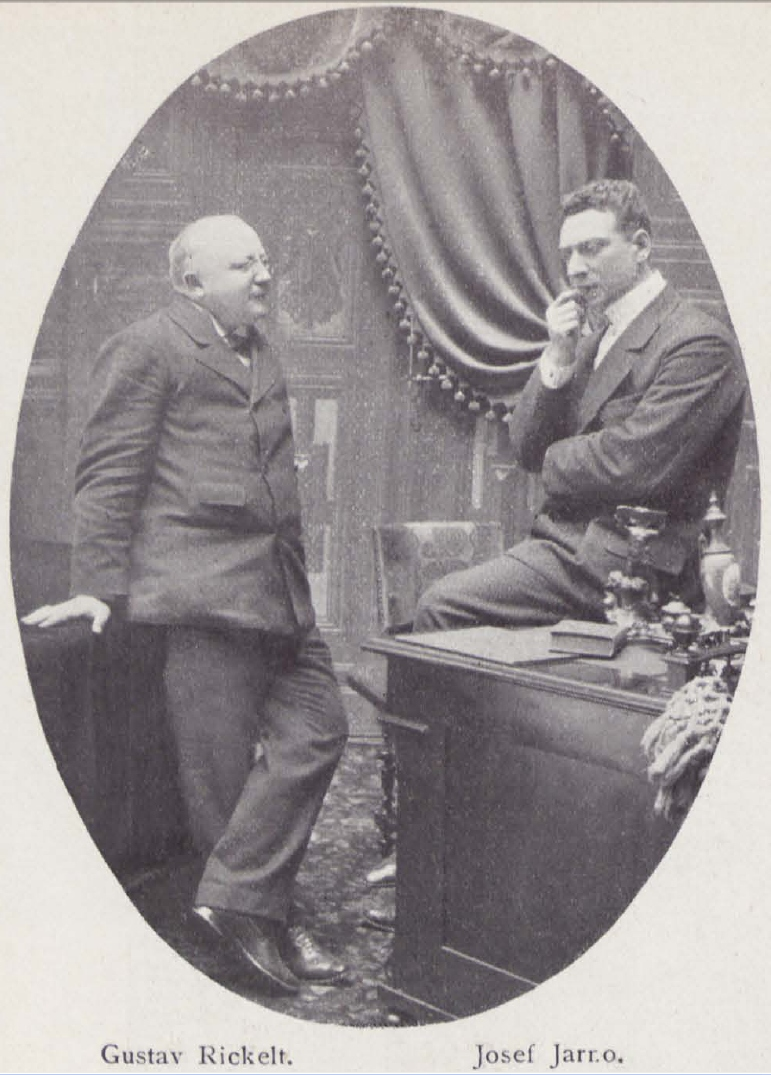 Gustav Rickelt (1862-1946), deutscher Schauspieler, Regisseur und Autor,und Josef Jarno, österreichischer Autor. Aufnahme von 1899.